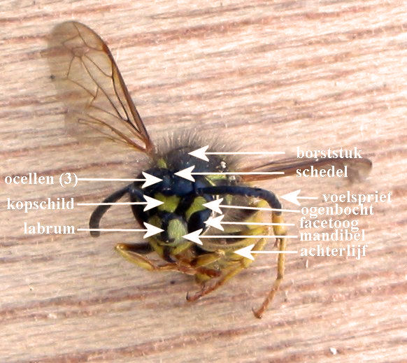 zelfgemaakte afbeelding van voorzijde wespenkop van de Gewone wesp